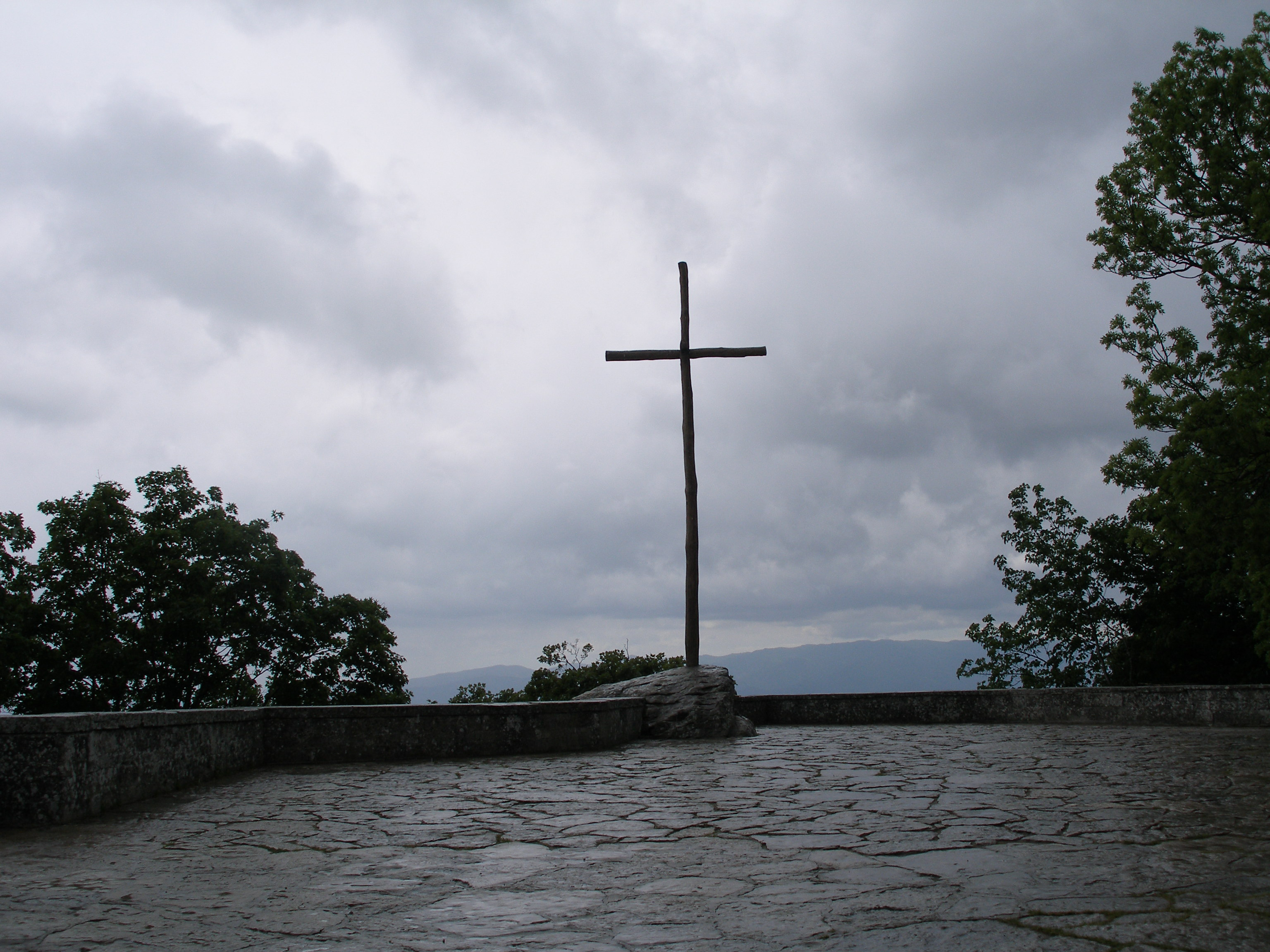 La Verna